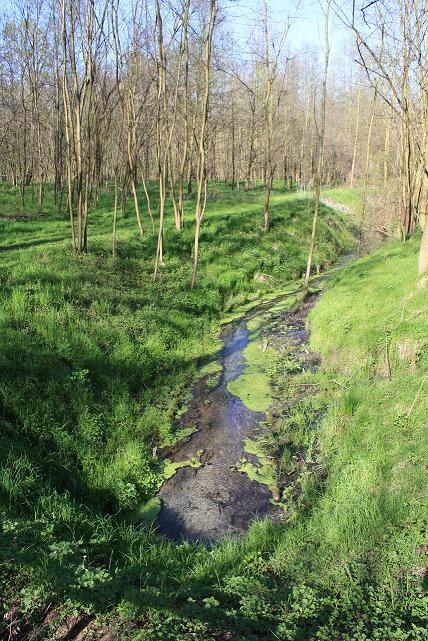 SIC Boschi del Vignolo, ZPS Boschi del Ticino, Italy, Garlasco, Parco Lombardo della Valle del Ticino